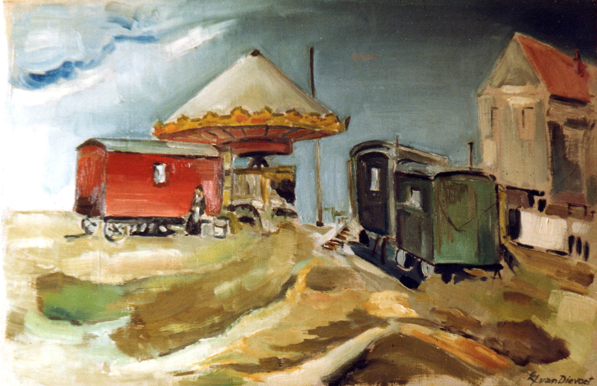 Huile sur toile par Léon van Dievoet (1907-1993), architecte, peintre, graveur, aquarelliste : "Le Carrousel", Bruxelles août 1939.